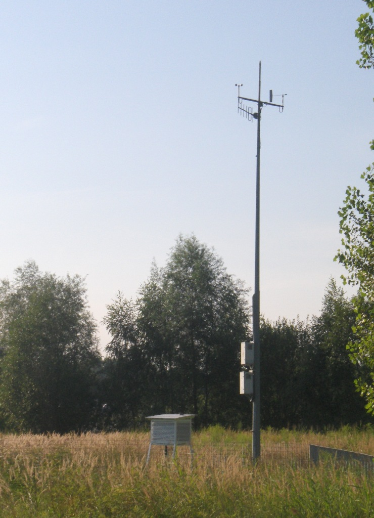 ogródek meteorologiczny